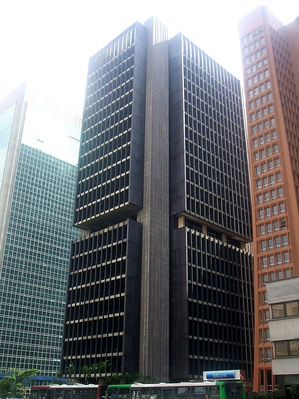 Banco Central do Brasil, na Avenida Paulista, São Paulo.